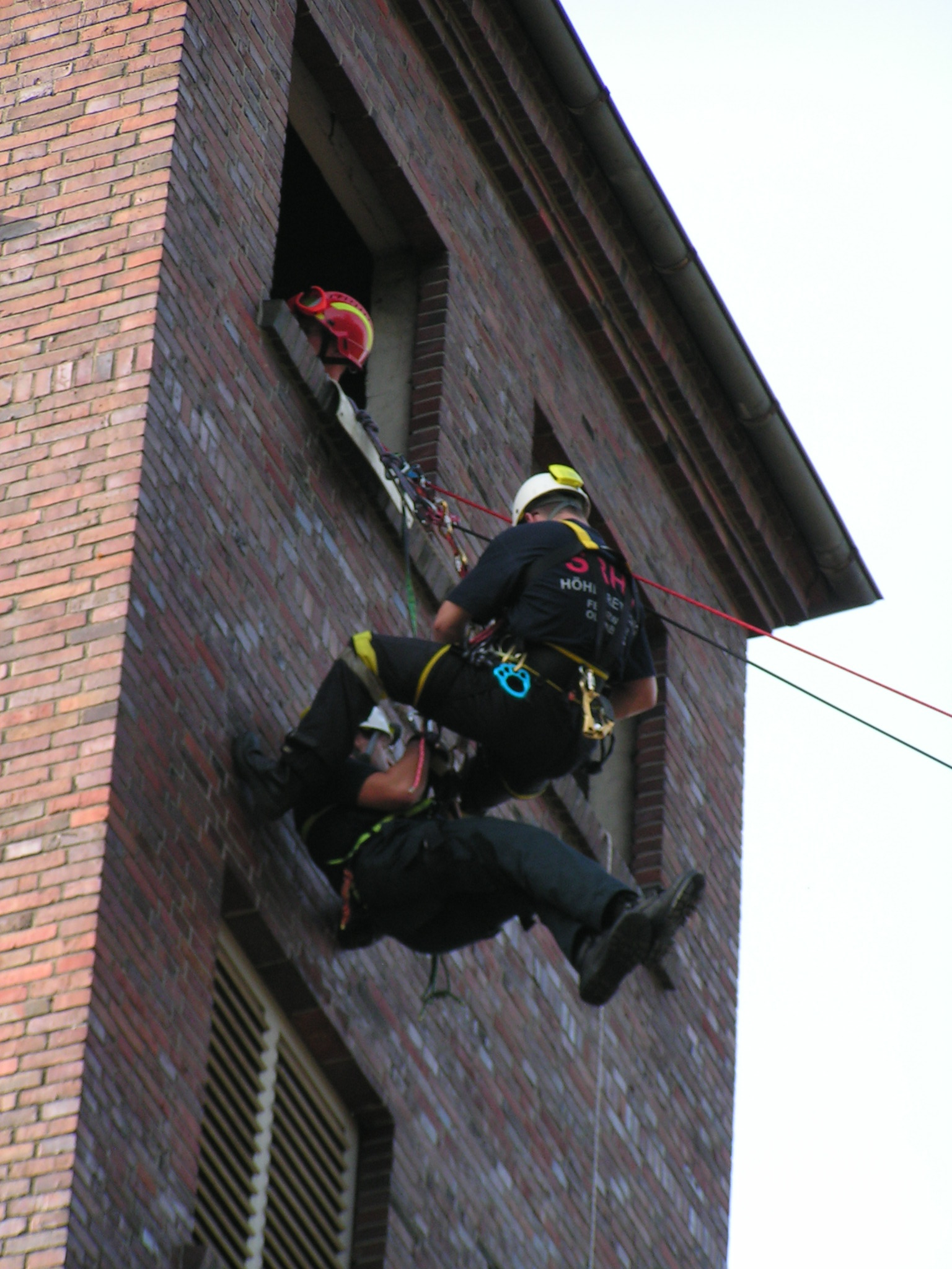 Rettungsübung in der Niedersächsischen Landes-Feuerwehrschule Loy